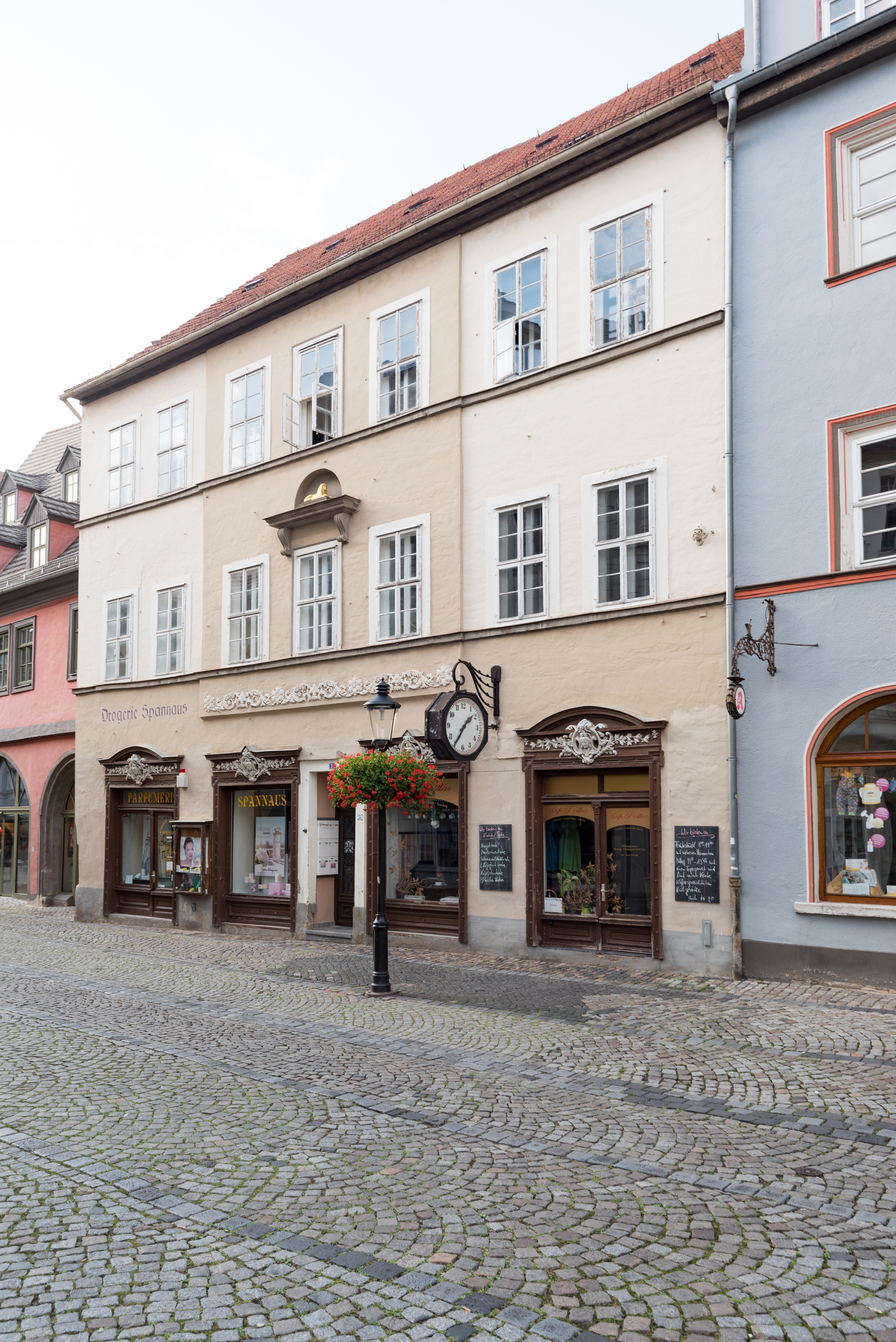 Naumburg (Saale), Herrenstraße 3